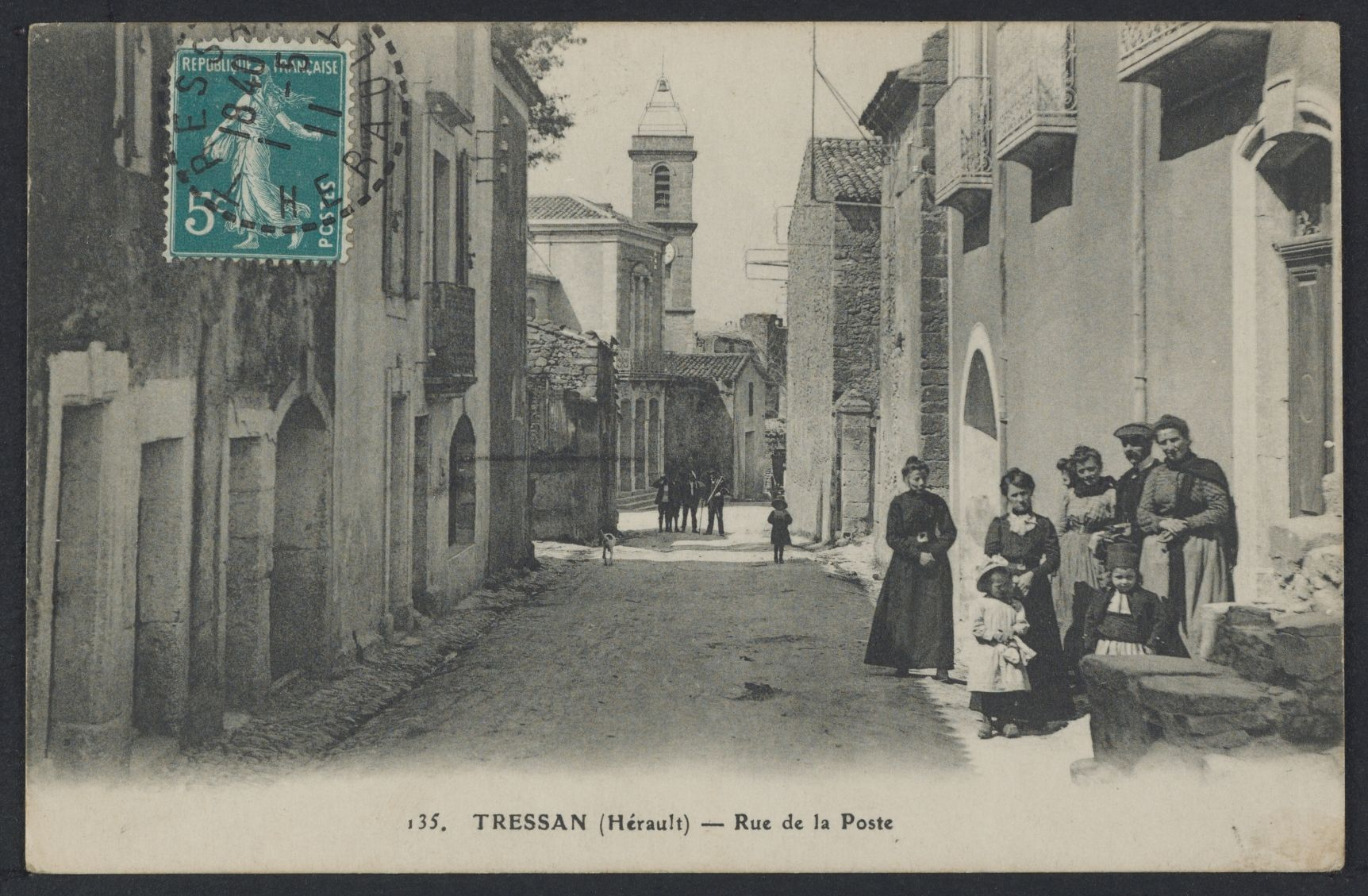 Tressan. - Rue de la Poste : carte postale